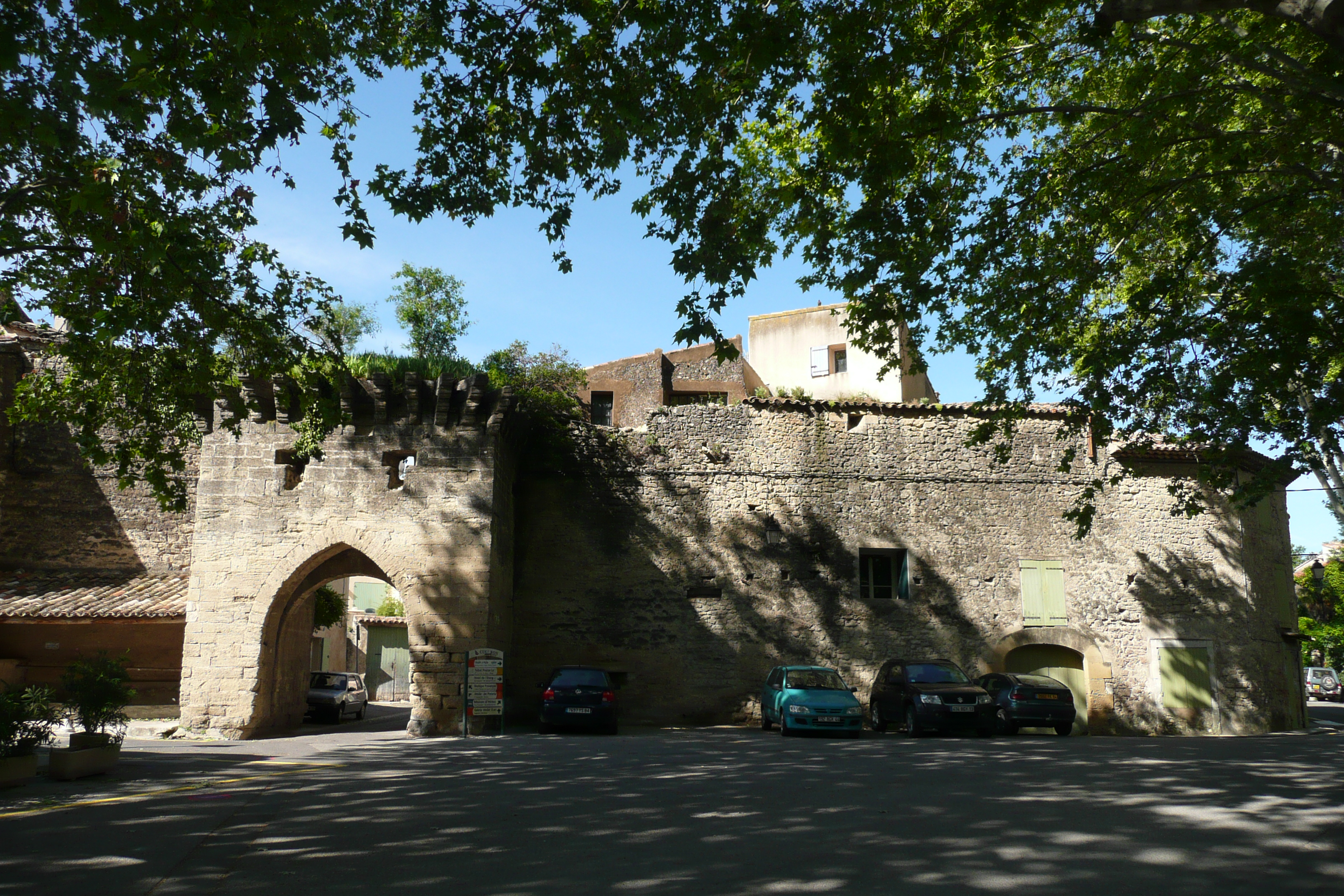 Rempart du Portail de l'Étang à Cucuron (Vaucluse, France).